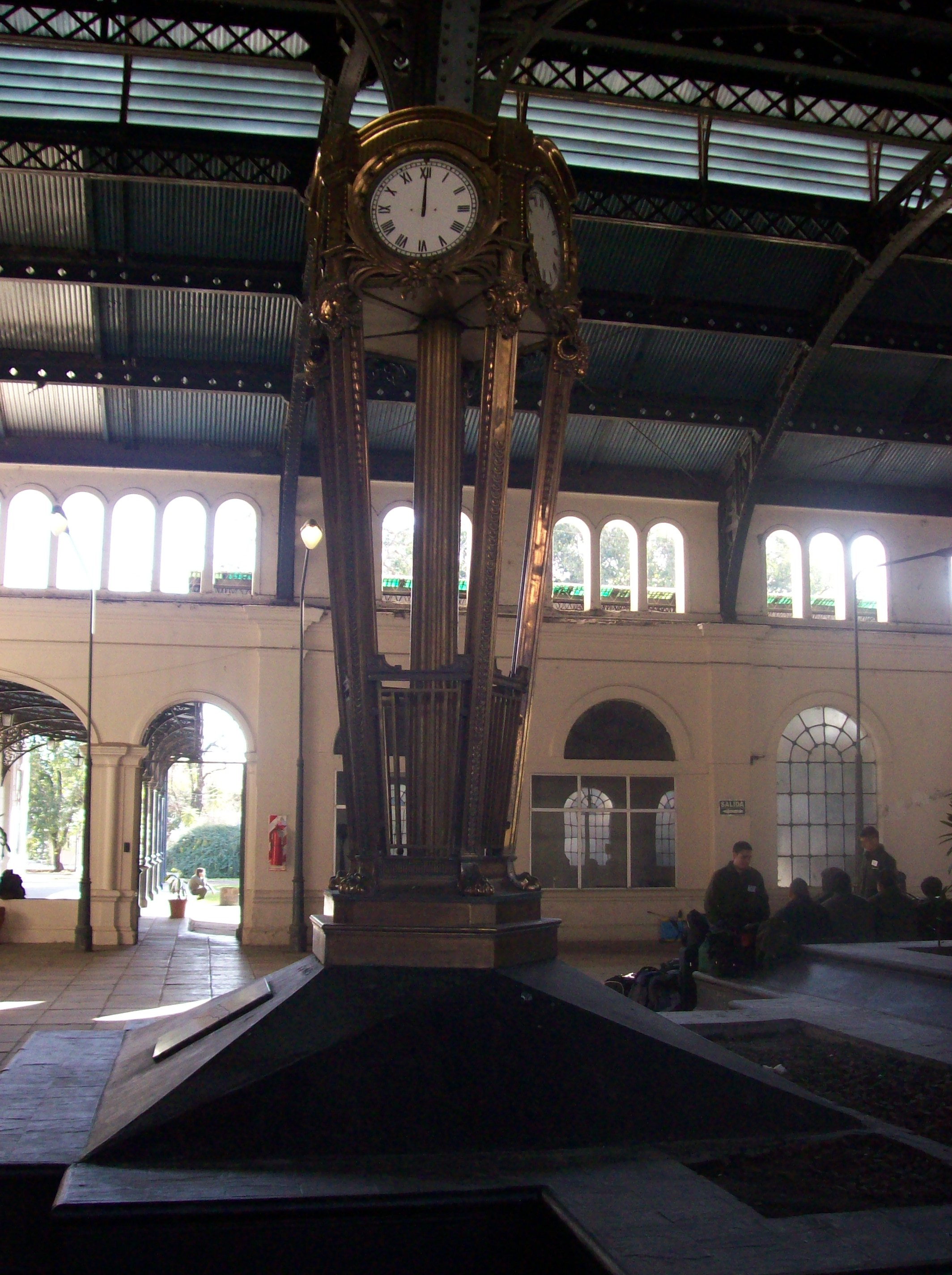 Reloj de la estación Mitre de San Miguel de Tucumán, provincia de Tucumán, Argentina.